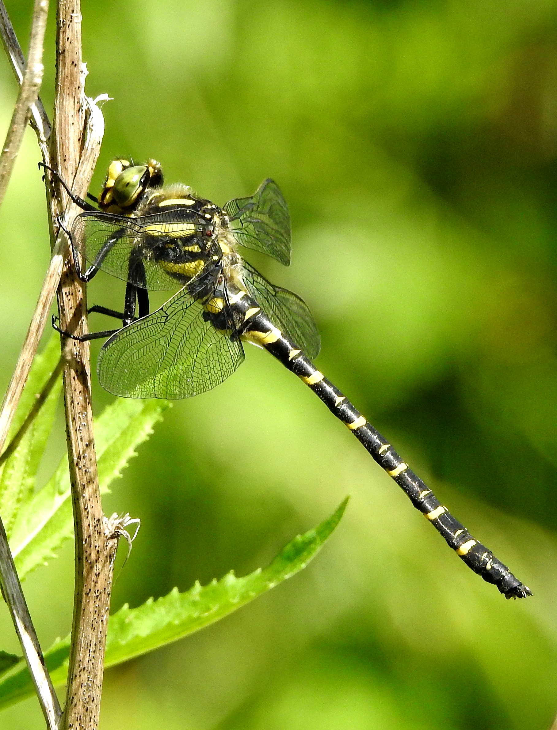 Zweigestreifte Quelljungfer (Cordulegaster boltonii). Gefährdete, in Deutschland gesetzlich geschützte Libellenart.